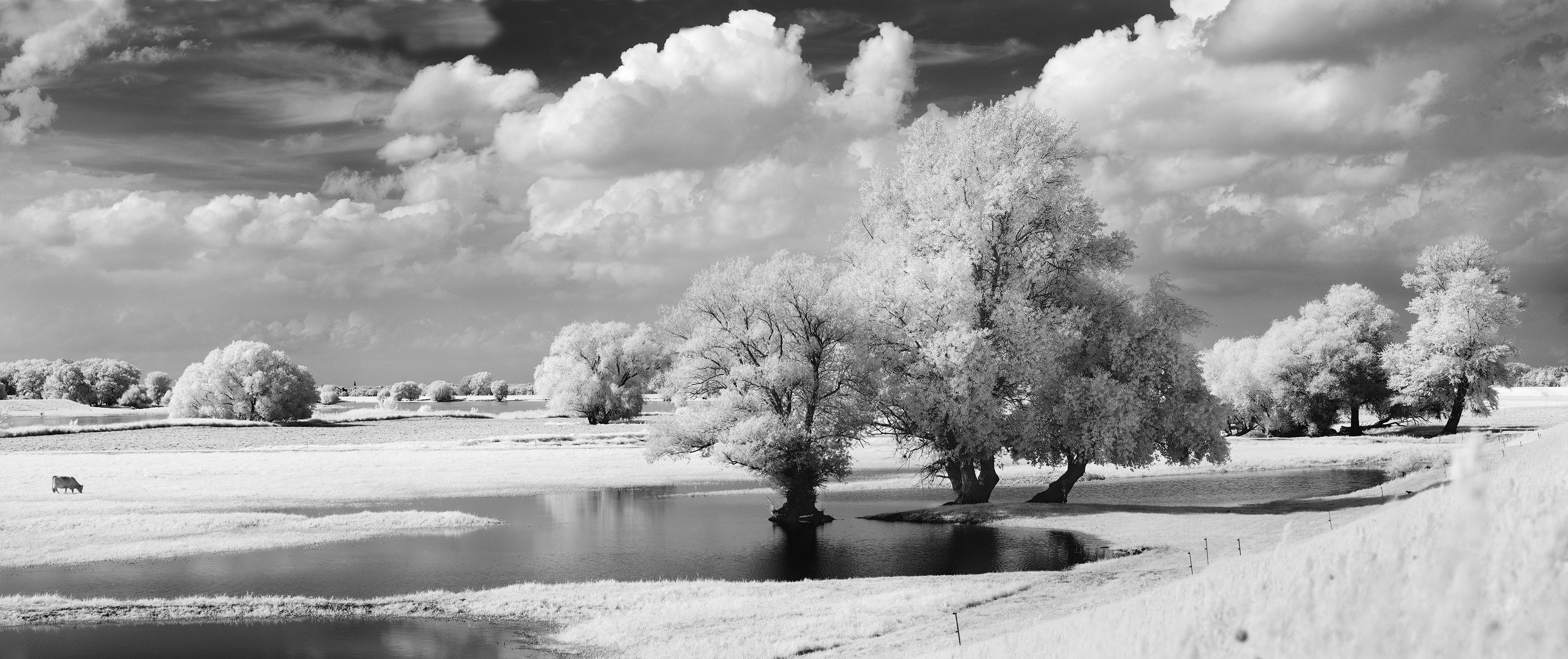 eine Infrarotaufnahme aus den Niedersächsischen Elbtalauen